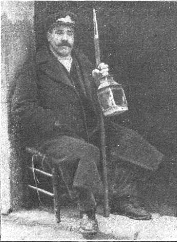 Imagen de un sereno español de principios del siglo XX. Lleva el característico chuzo y un farol.